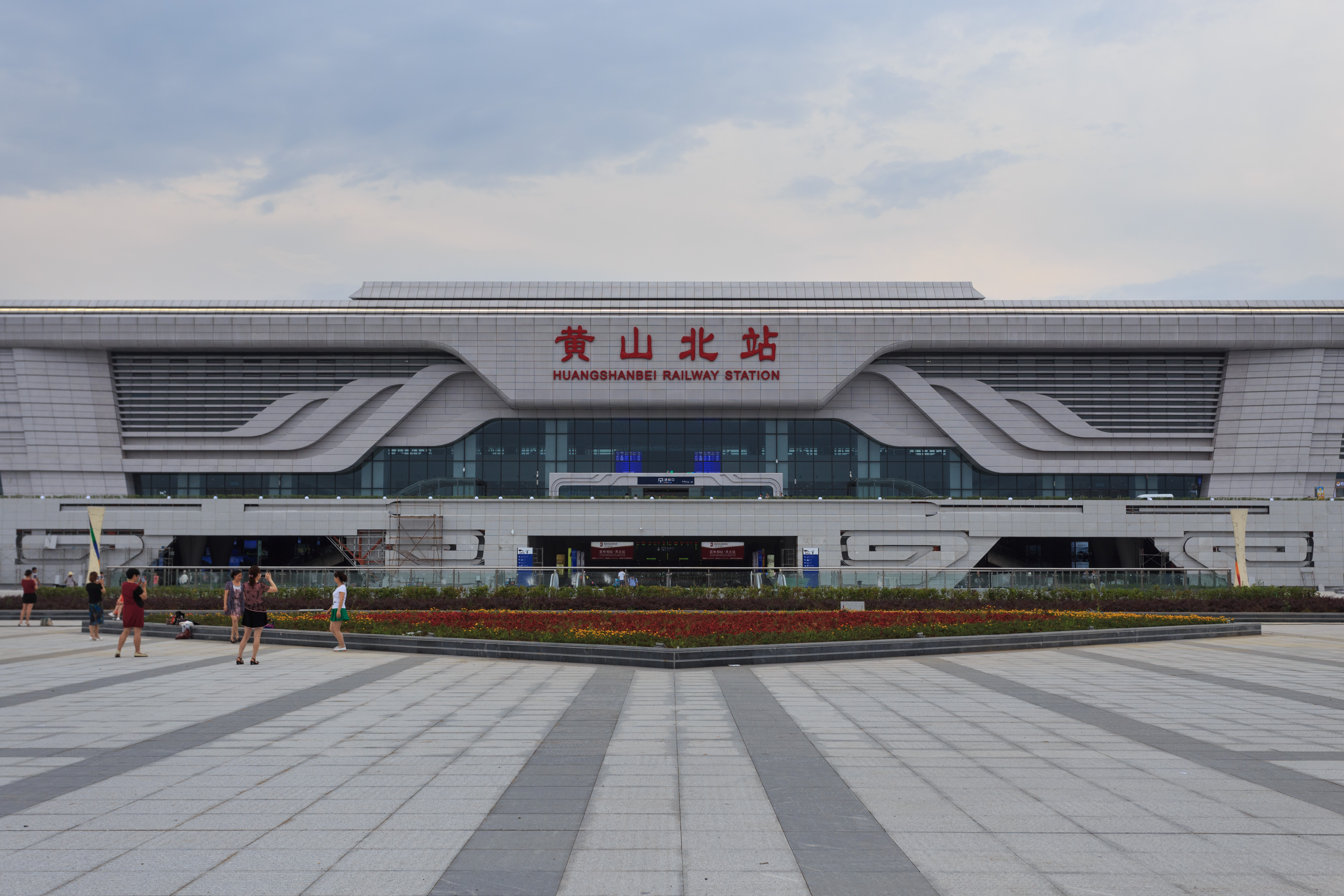 黄山北站